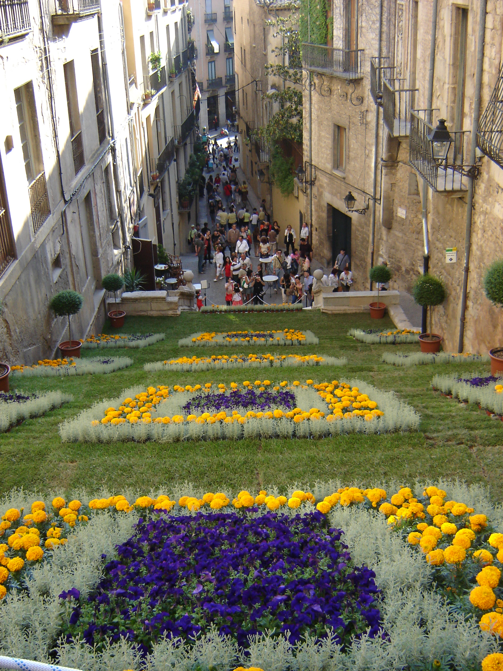 Escales Pujada Sant Domènec